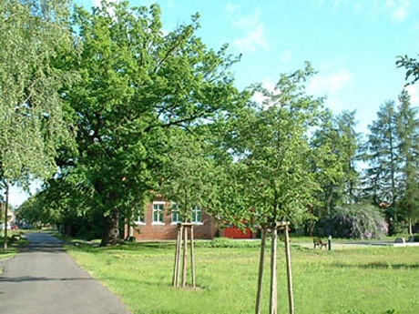 Die Dorfeiche verdeckt das Gemeindehaus mit dem Feuerwehrneubau